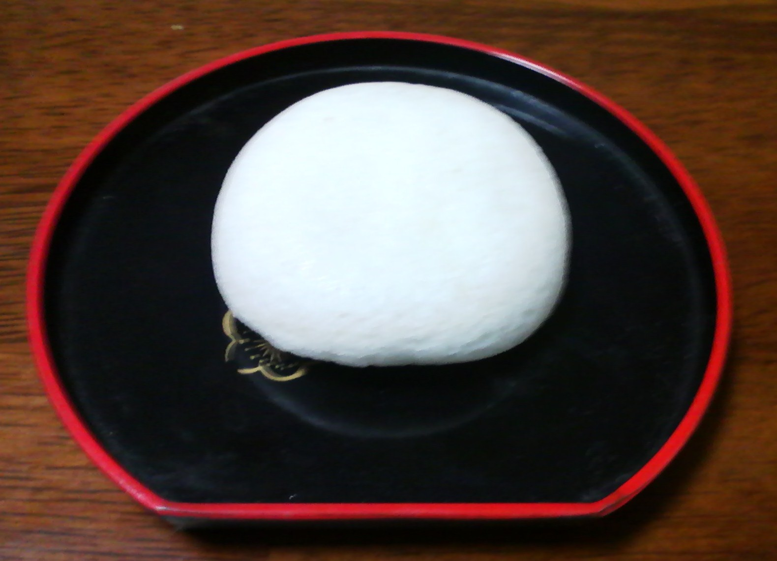 軽羹の画像。（鹿児島県産）